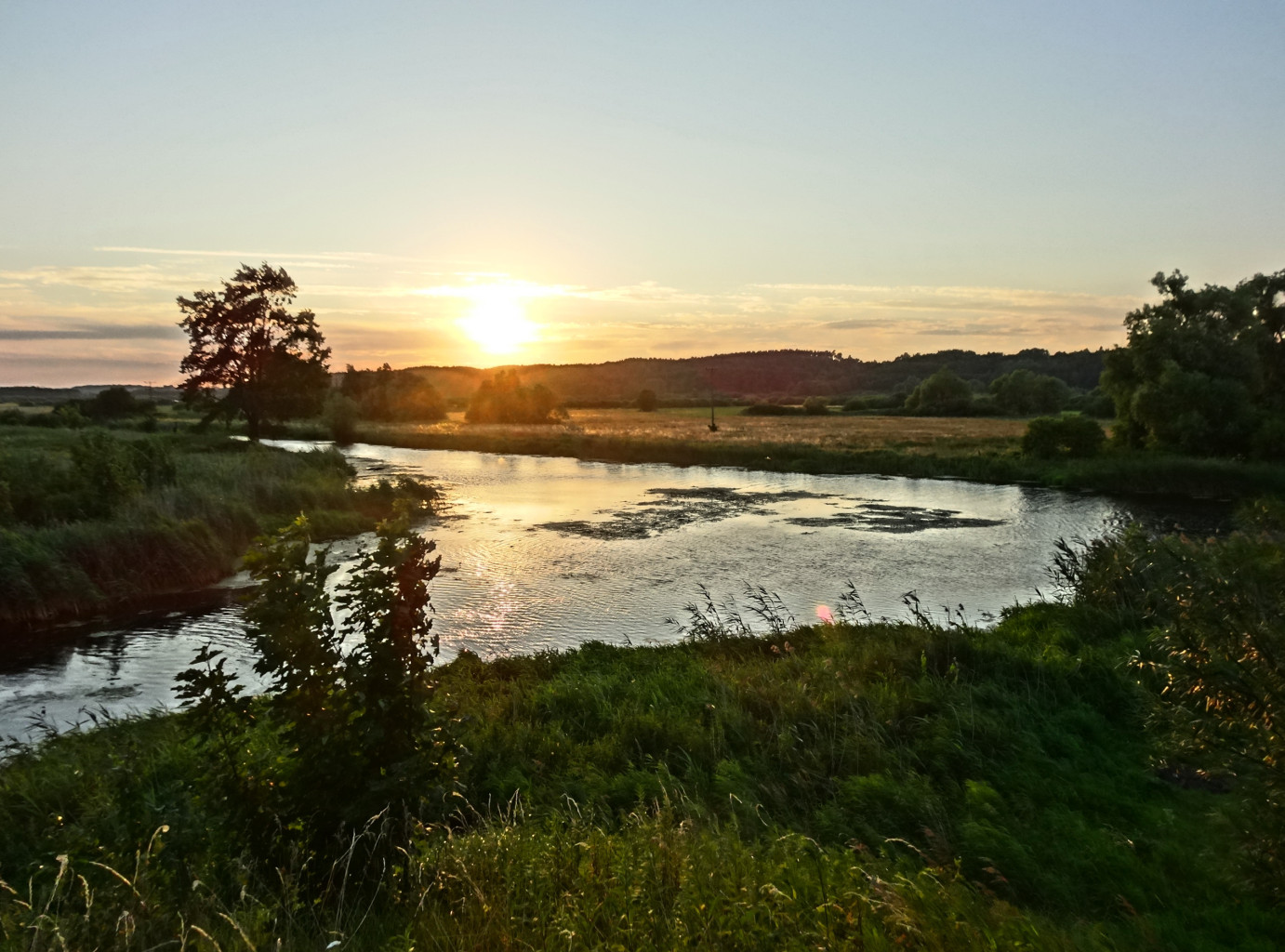 Kanał Górnonotecki - ujście do Kanału Bydgoskiego